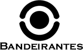 Primeiro logotipo da Rede Bandeirantes